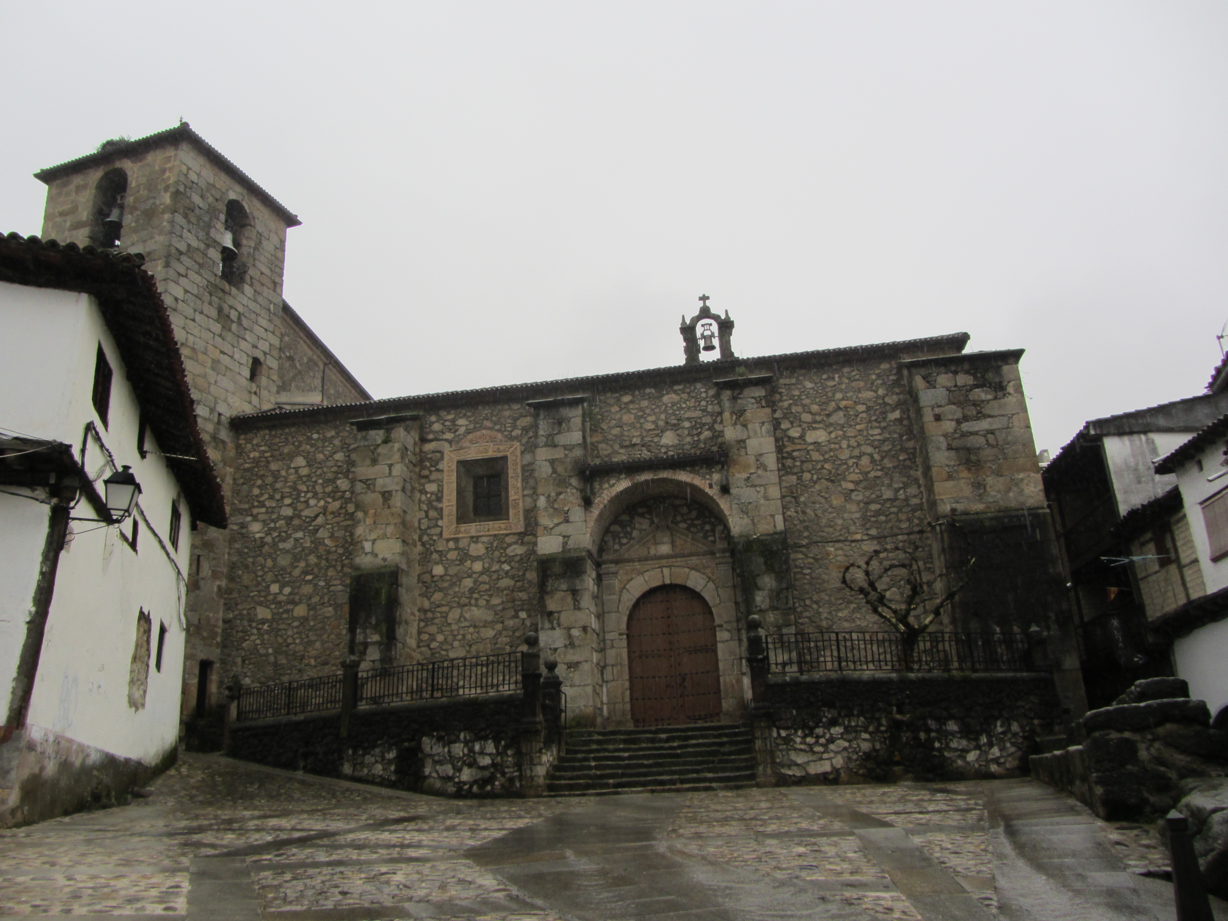 "San Miguel Arcangel" eliza.